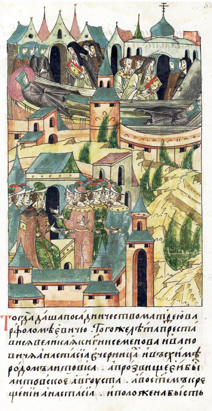 ЛИЦЕВОЙ ЛЕТОПИСНЫЙ СВОД Тогда отдано было посадничество Матфею Варфоломеевичу. В том году преставилась великая княгиня Семена Ивановича — Анастасия, черницей, в схиме, родом литовка. Литовское имя ее было Августа, а в святом крещении Анастасия. И положена была [в монастыре, в церкви святого Спаса на Москве, которую же она сама повелела расписать, и покровительствовала всем живущим там инокам, и почитала их.]